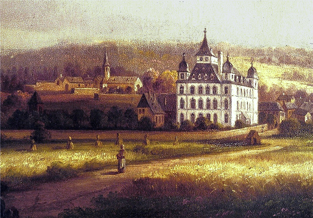 Kurfürstliches Schloss zu Kärlich (Gemälde im Mittelrhein-Museum Koblenz um 1790